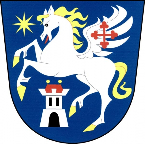 znak, Radešín, okres Žďár nad Sázavou